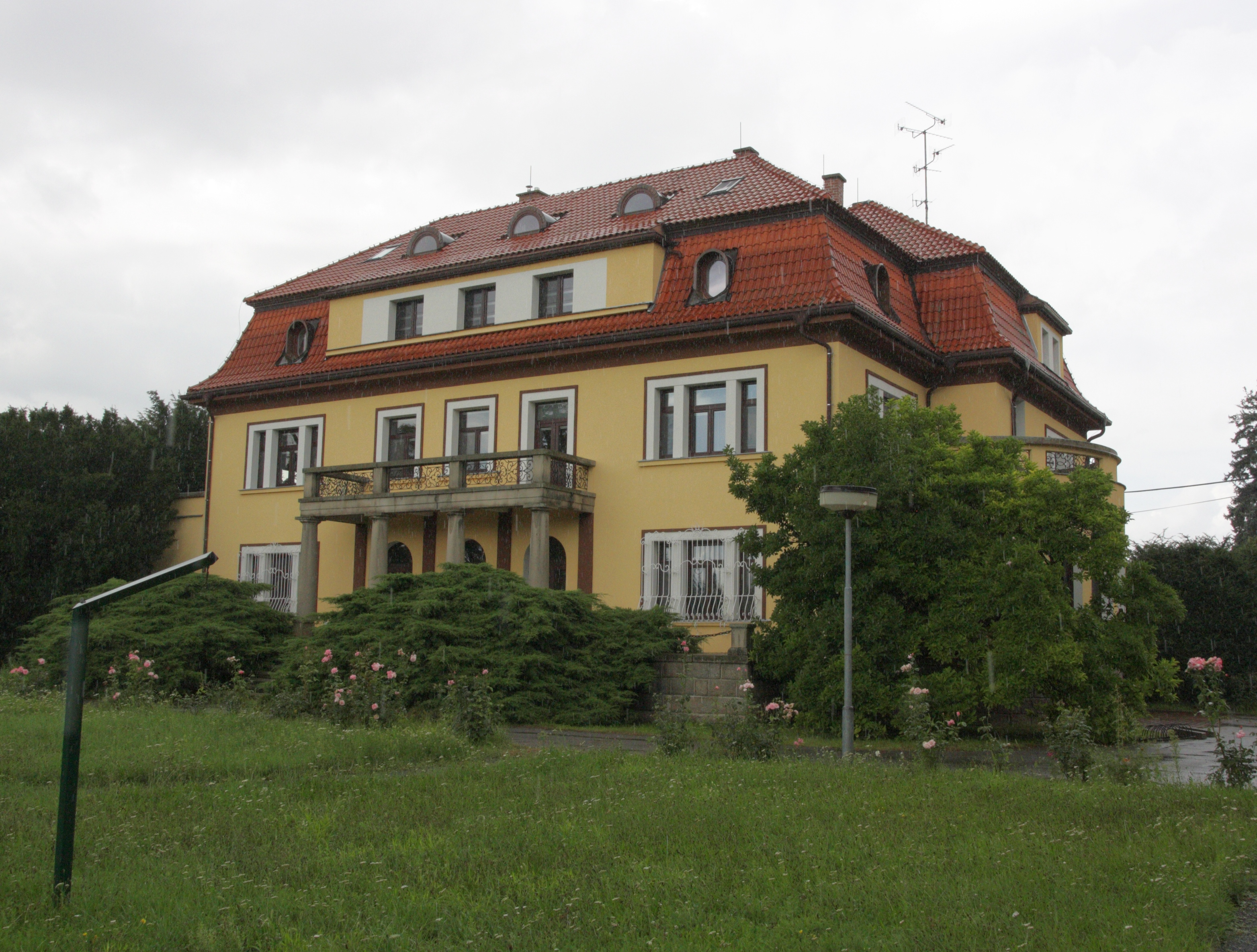 Cvrčovice (okres Brno-venkov) - zámek, zahradní průčelí.